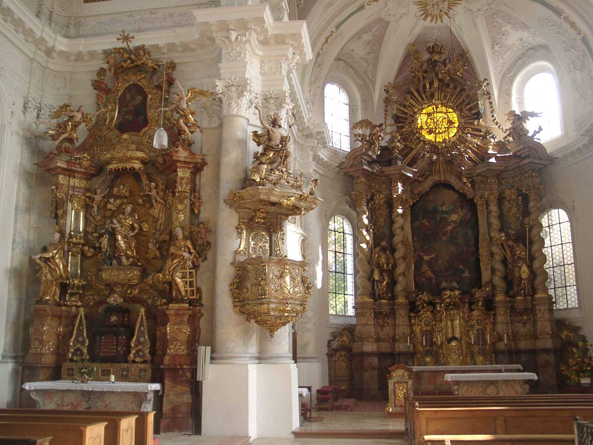 Landshut, Kloster Seligenthal